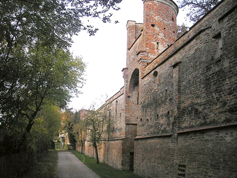 Landsberg am Lech (Oberbayern). Nordöstlicher Mauerzug der Stadtbefestigung, Stadtseite. Eigene Aufnahme, Okt. 2006 / Landsberg am Lech (Upper Bavaria, Germany). City wall, looking northeast (inside). Own photo, Oct. 2006